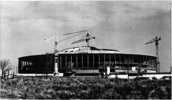 Il Palazzo dello Sport di Roma in fase di costruzione Categoria:Immagini del Palazzo dello Sport di Roma